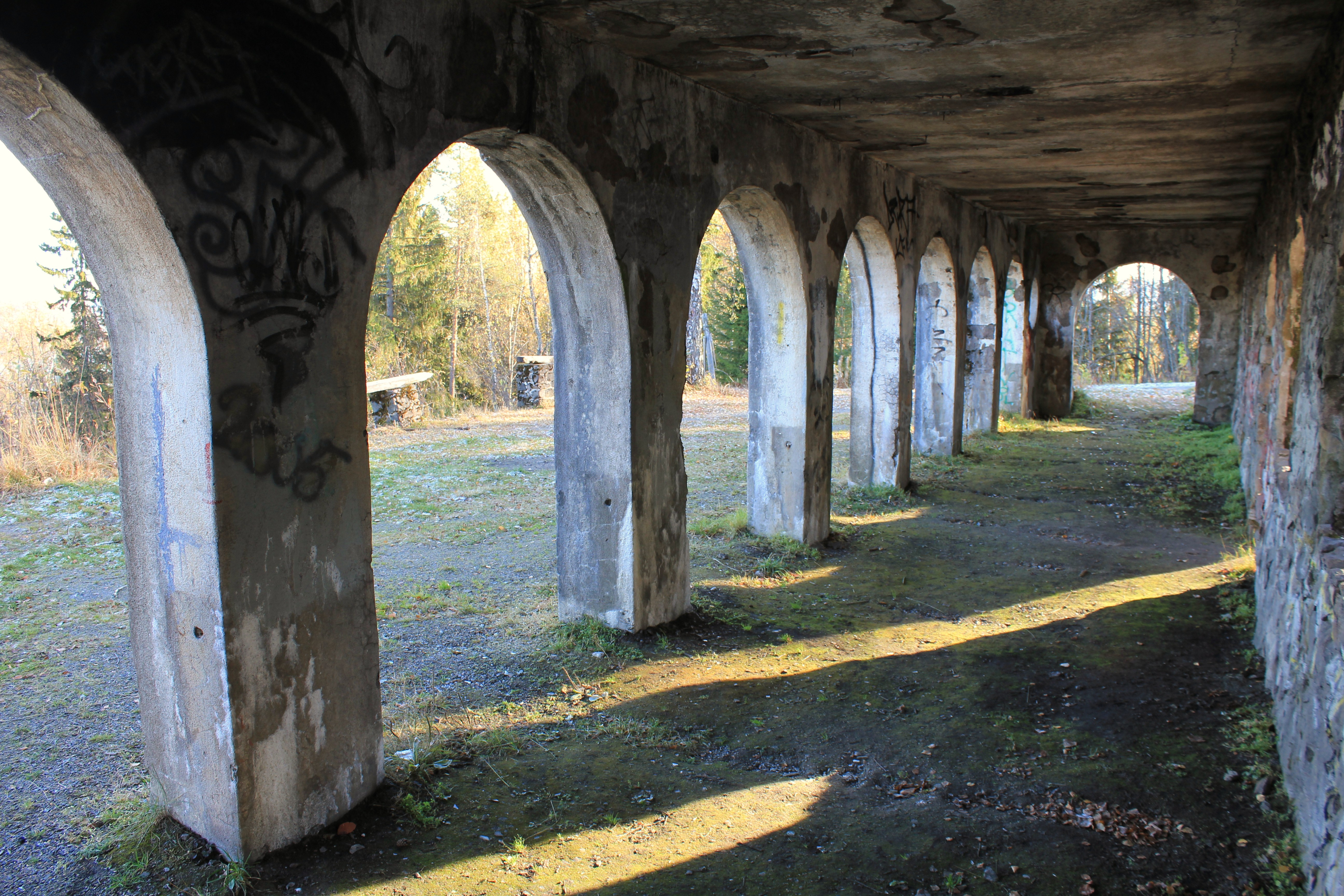 I boka "Gjøvik 100 år" av Reidar Mollgard, står bl.a. følgende: "I 1920-årene var det krisetid i Gjøvik med meget stor arbeidsledighet. Kommunen gjorde hva den maktet for å motvirke arbeidsløsheten i disse årene. En måtte prøve å finne nye muligheter for å skaffe arbeide, og det neste spørsmålet som kom opp var bygging av restaurant på Hovdetoppen, også det som en arbeidsløshetssak. Ordføreren foreslo at kommunen av hensyn til den store ledigheten godtok et tilbud fra Frydenlund Bryggeri om et lån på 75.000,- til oppføring av restauranten. Arbeidet skulle utføres som et ordinært bygg- og anleggsarbeid, og lønningene fastsettes på forhånd etter avtale med arbeiderne. Lånet var bl.a. betinget av at kommunen festet bort 40 mål av Hovde til et "A/S Hovdetoppen". Det var en forutsetning at anlegget etter 30 år tilfalt kommunen uten vederlag. Selskapet skulle av kommunen få rett til skjenking av øl og vin. Det var sterk dissens om restaurantsaken både i formannskap og bystyre, og fra avholdsorganisasjonene kom det protester, men bystyret vedtok innstillingen 2. mars 1927 med 26 mot 2 stemmer. Det viser hvor tungt hensynet til de arbeidsløse veide. Utpå våren tok arbeidet med vannledningen til Hovdetoppen, vegen som var påbegynt tidligere ble fullført, og den 6. oktober 1928 kunne restauranten åpnes. Hovdetoppen restaurant brant ned i 1964."